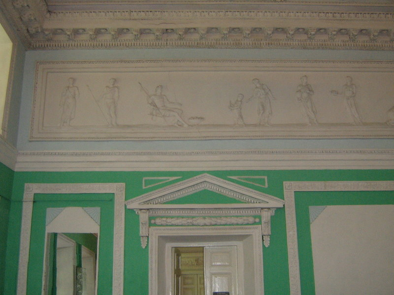 стіна